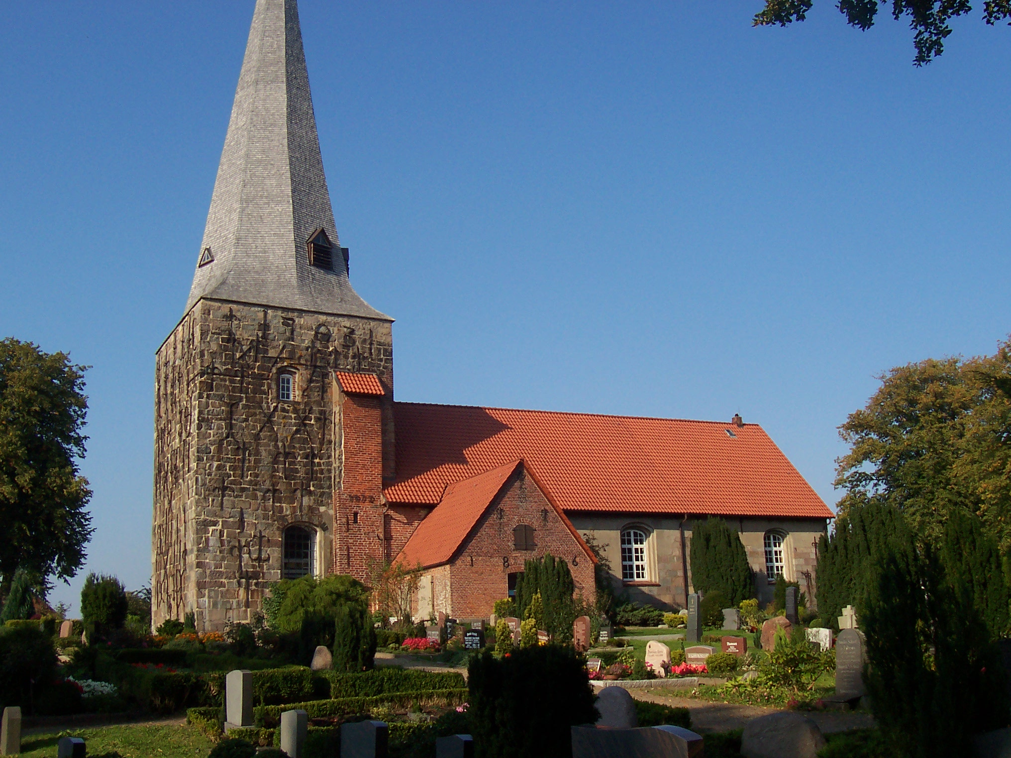 St. Vincentus Kirche Husby